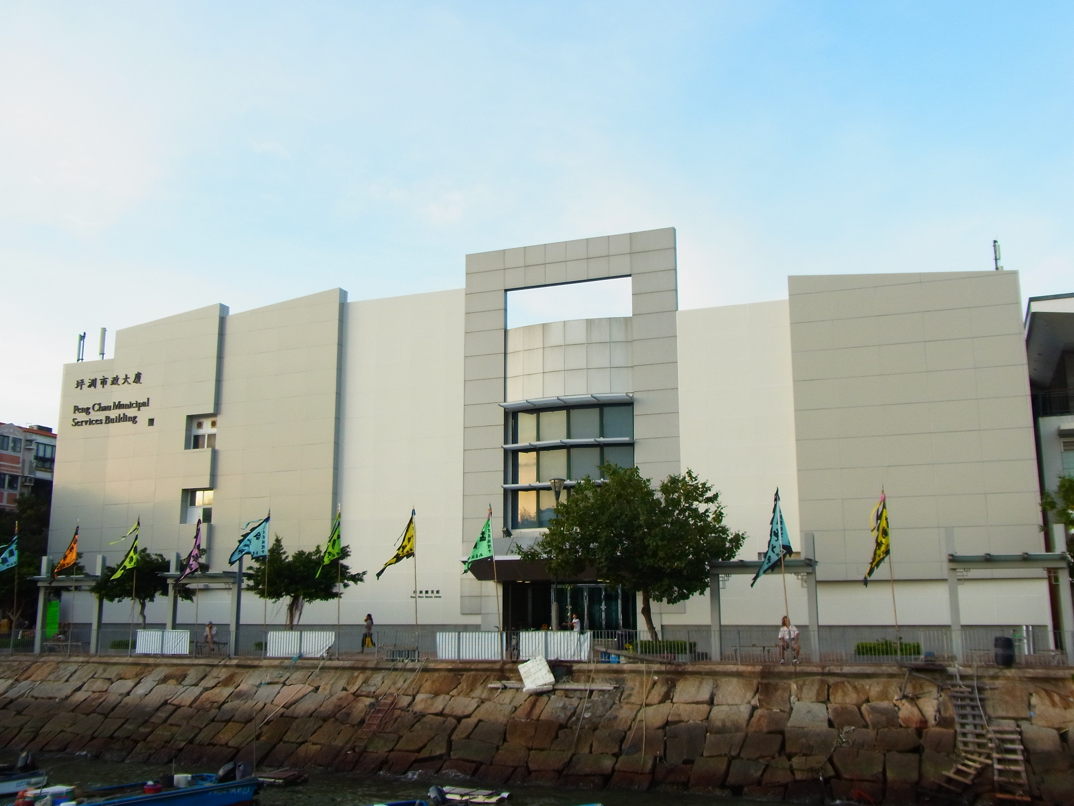 中文（香港）: 坪洲市政大樓